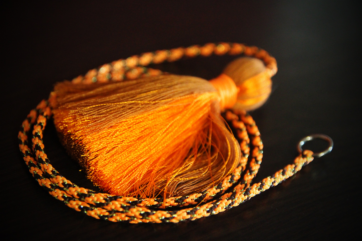 Ринговка (с кисточкой) для собак, сплетенная из 8 атласных нитей – специальный поводок для управления собакой при показе в ринге на выставке или племенном смотре собак.